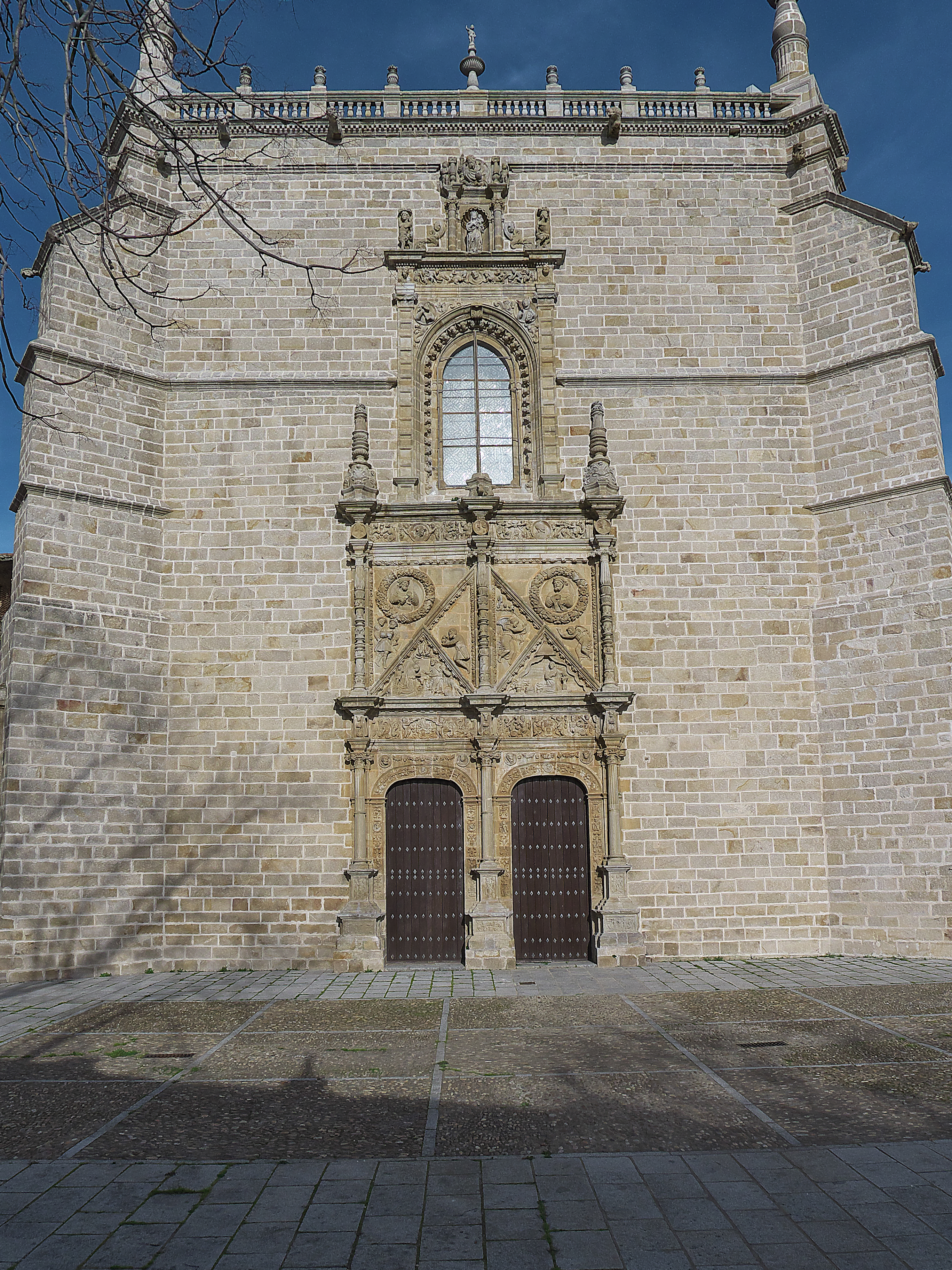 Hastial occidental. Pedro de Ibarra (†1570), maestro mayor de la Orden Militar de Alcántara, termina el último tramo de la catedral (1547-1549).